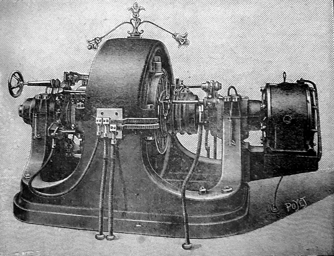 Commutatrice Westinghouse, gravure de Louis Poyet